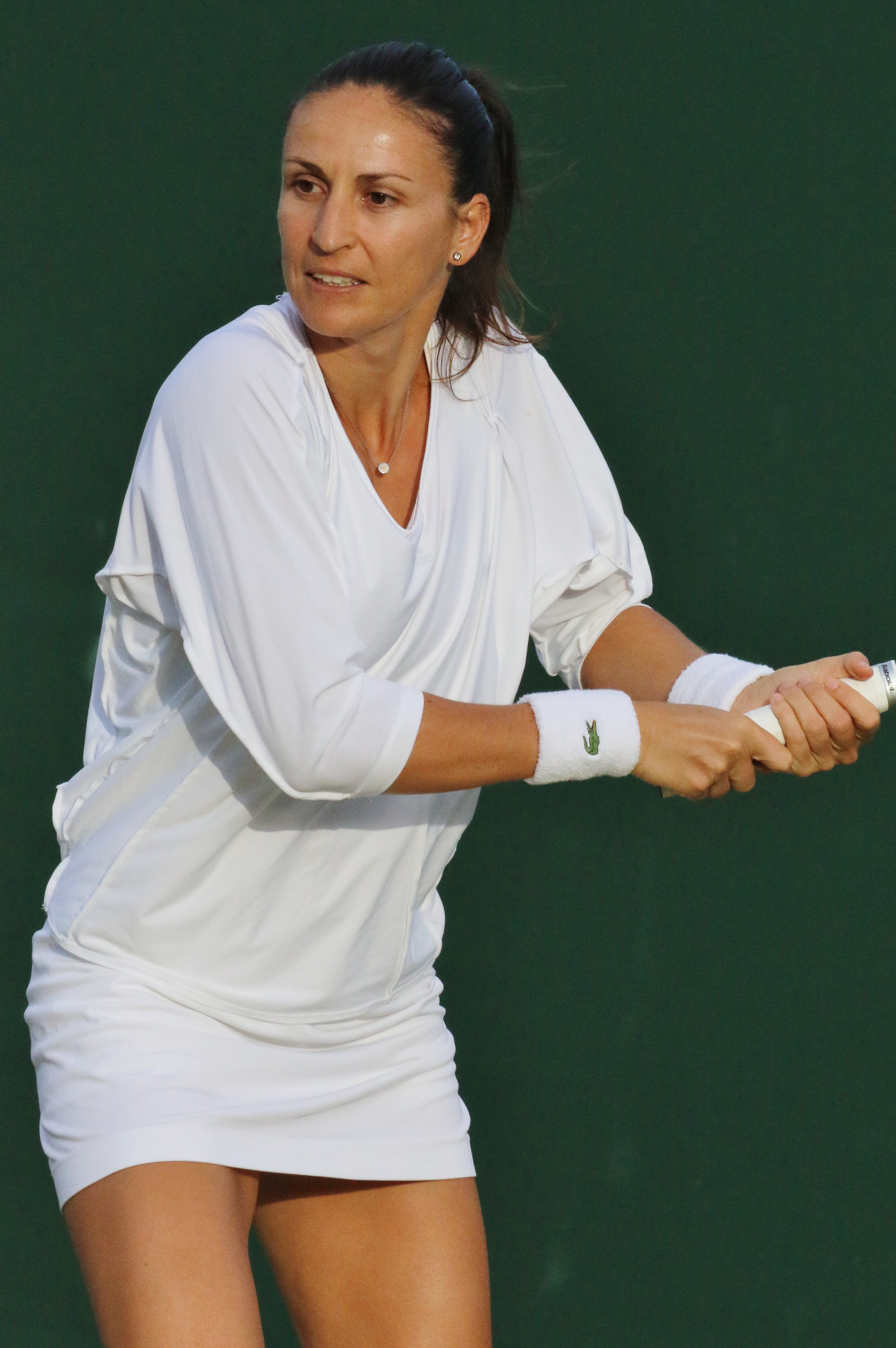 Parra Santonja WM16 (4)